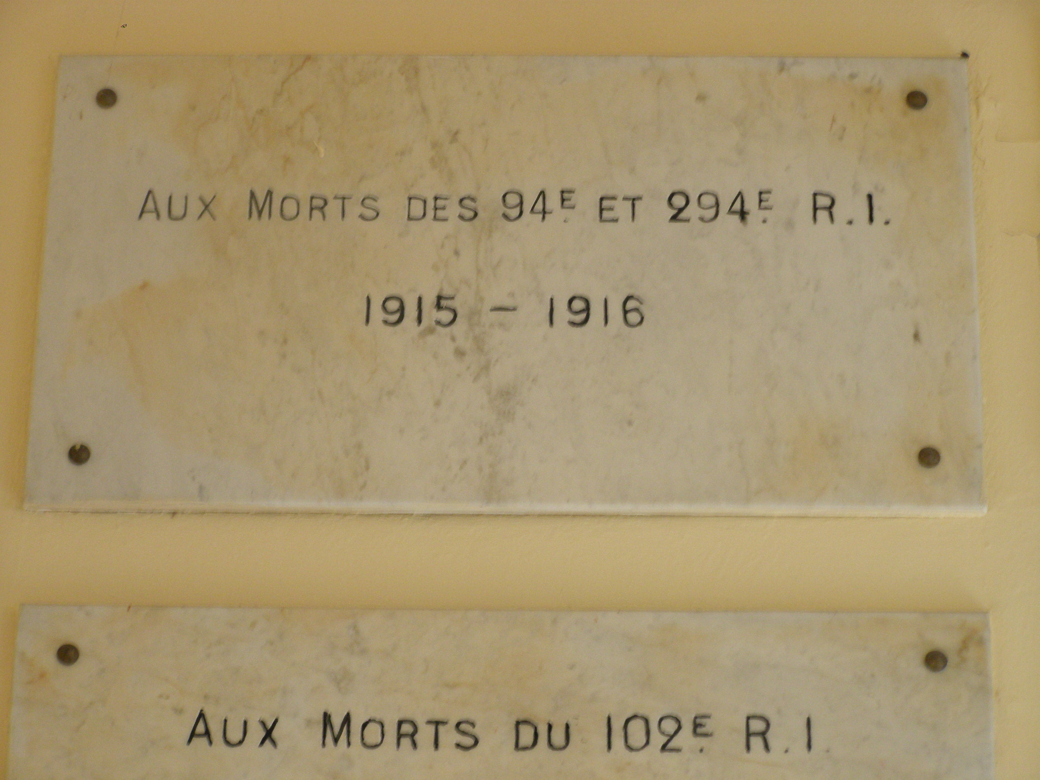 Plaque aux morts du 94 et 294 RI à Navarin - Souain